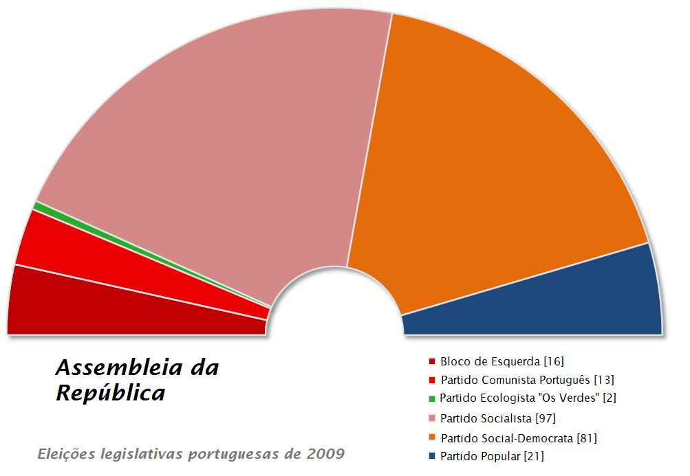 Composição da Assembleia da República, mostrando o número de mandatos que cada partido obteve através das eleições legislativas portuguesas de 2009.